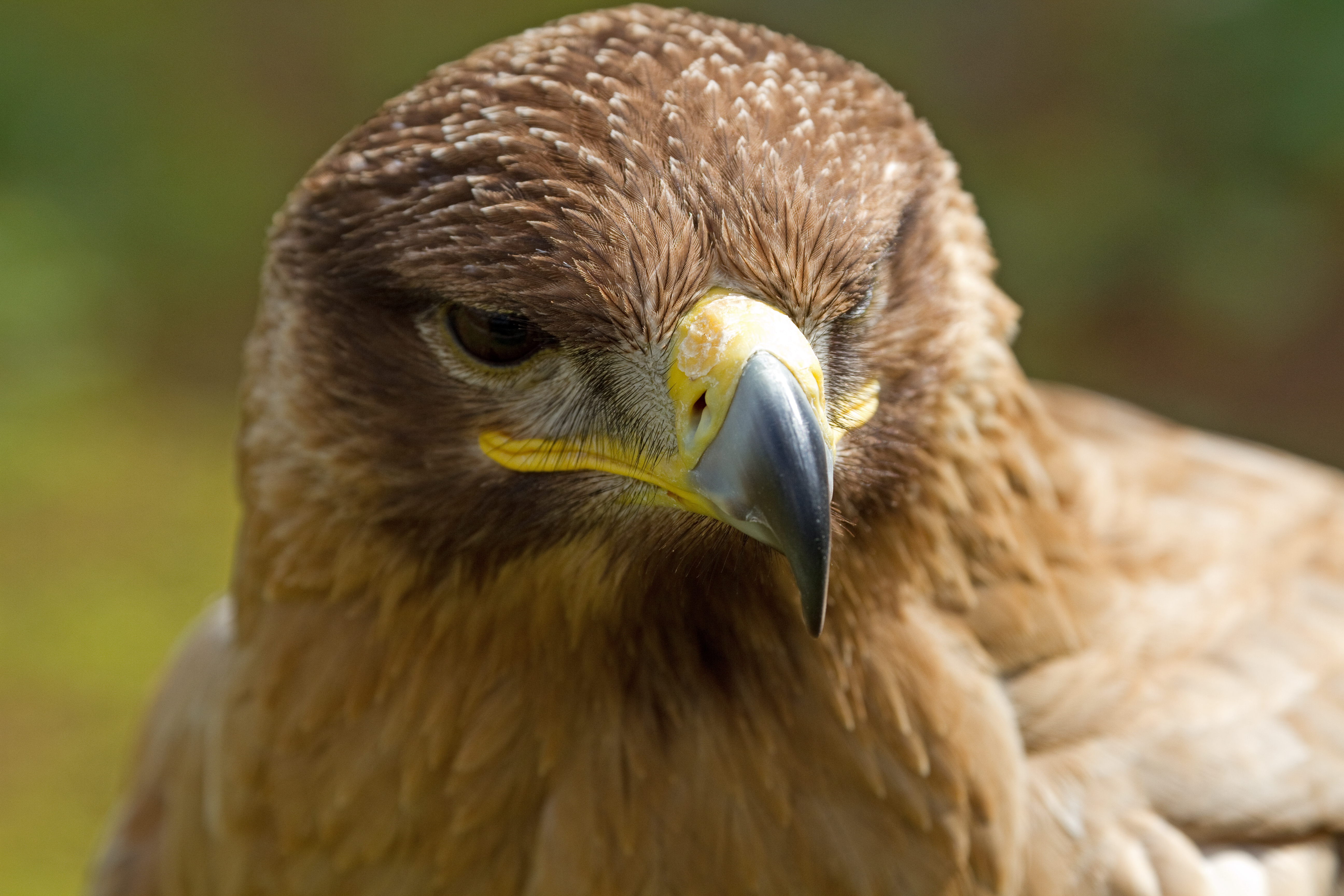 Indian Tawny Eagle